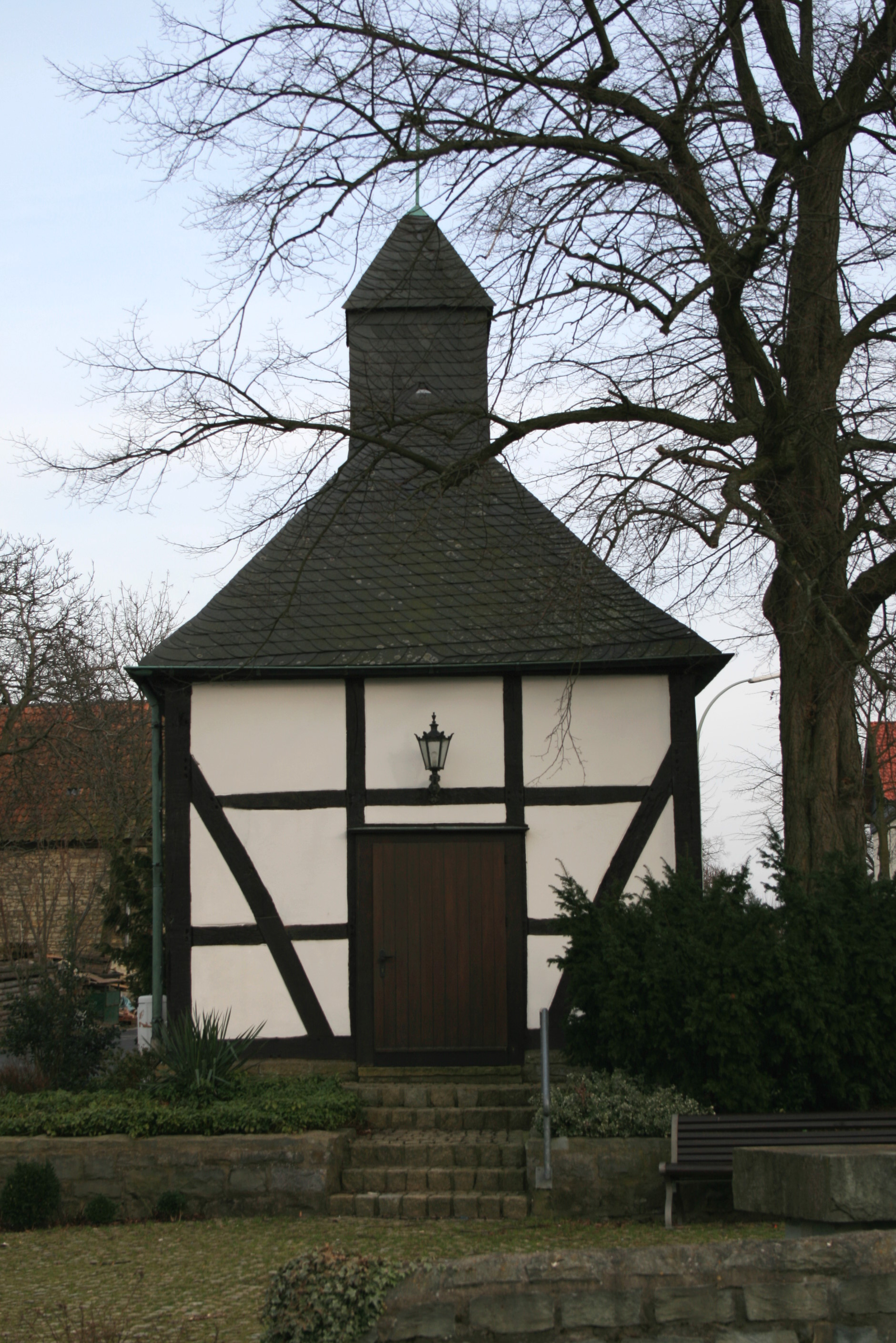 St. Rochus Kapelle (erbaut 1729) in Oberense, Gemeinde Ense.